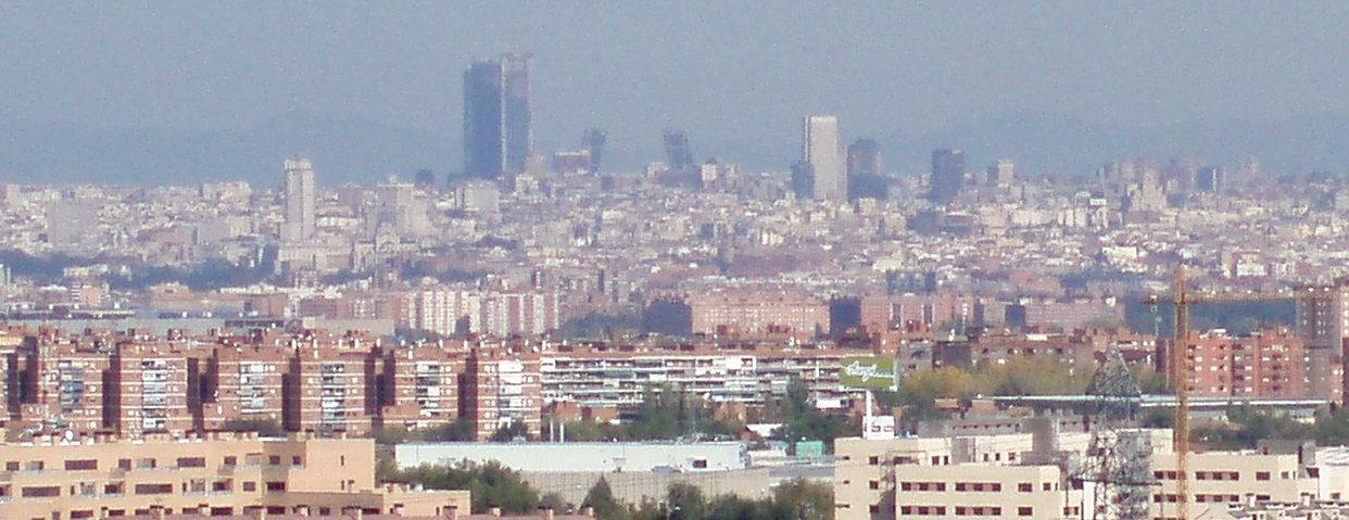 Rascacielos de Madrid (España).